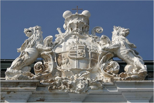 Teil der Rheinfassade Schloss Engers